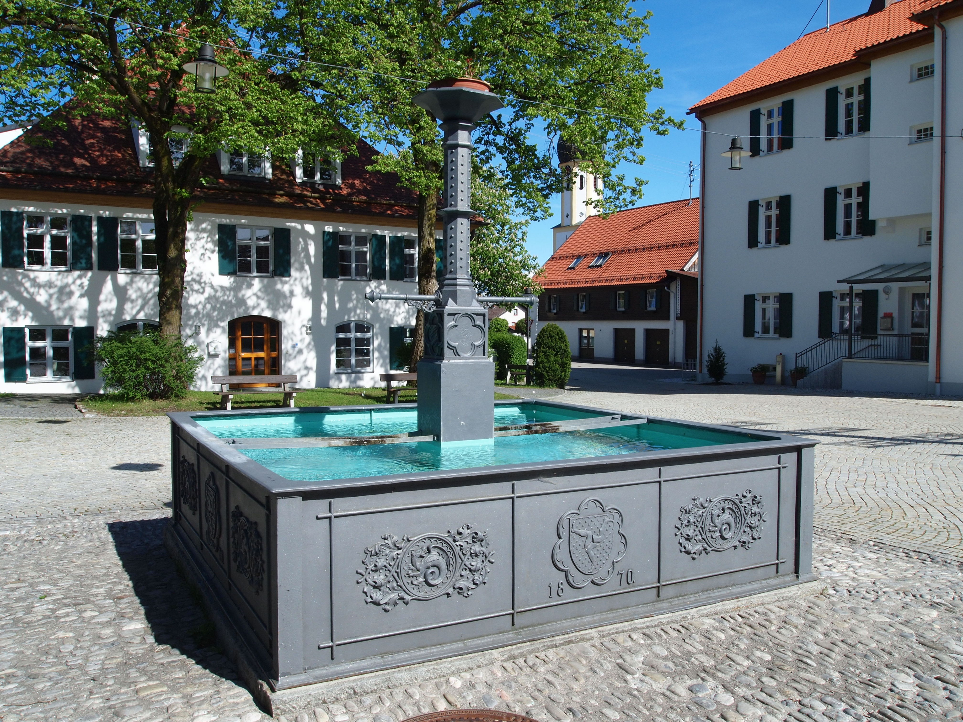 Roßhaupten, Brunnen von 1870, Dorfplatz